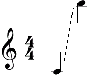 ADAD Bouzoui sound range